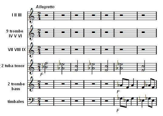 Début de la sinfonietta de Leos Janacek